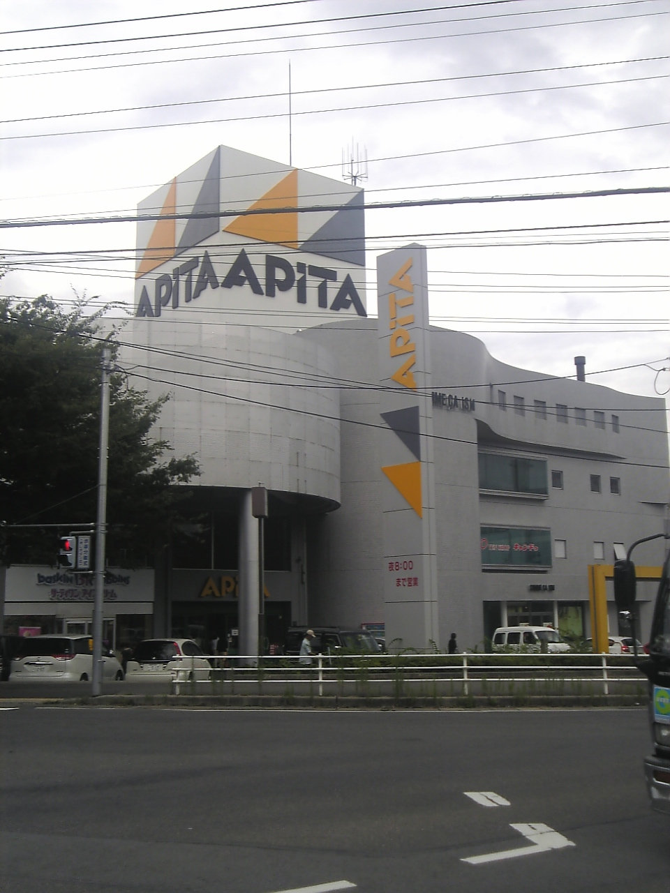 アピタ岡谷店店舗外観